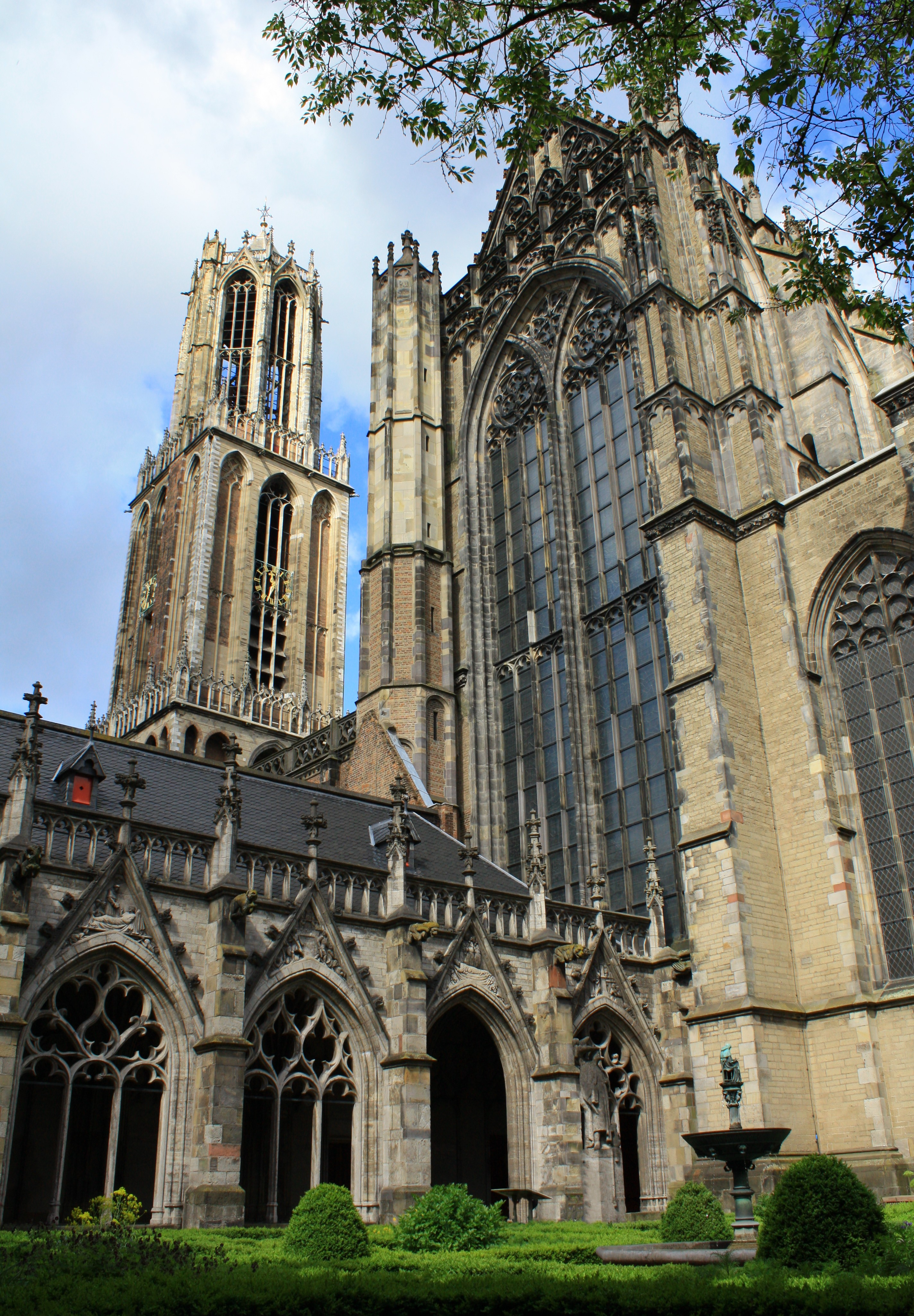 Overzicht van de Domtoren, het transept van de Domkerk en de pandhof.